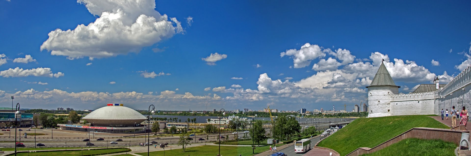 Здание цирка: улица Кремлевская, Казань, Татарстан